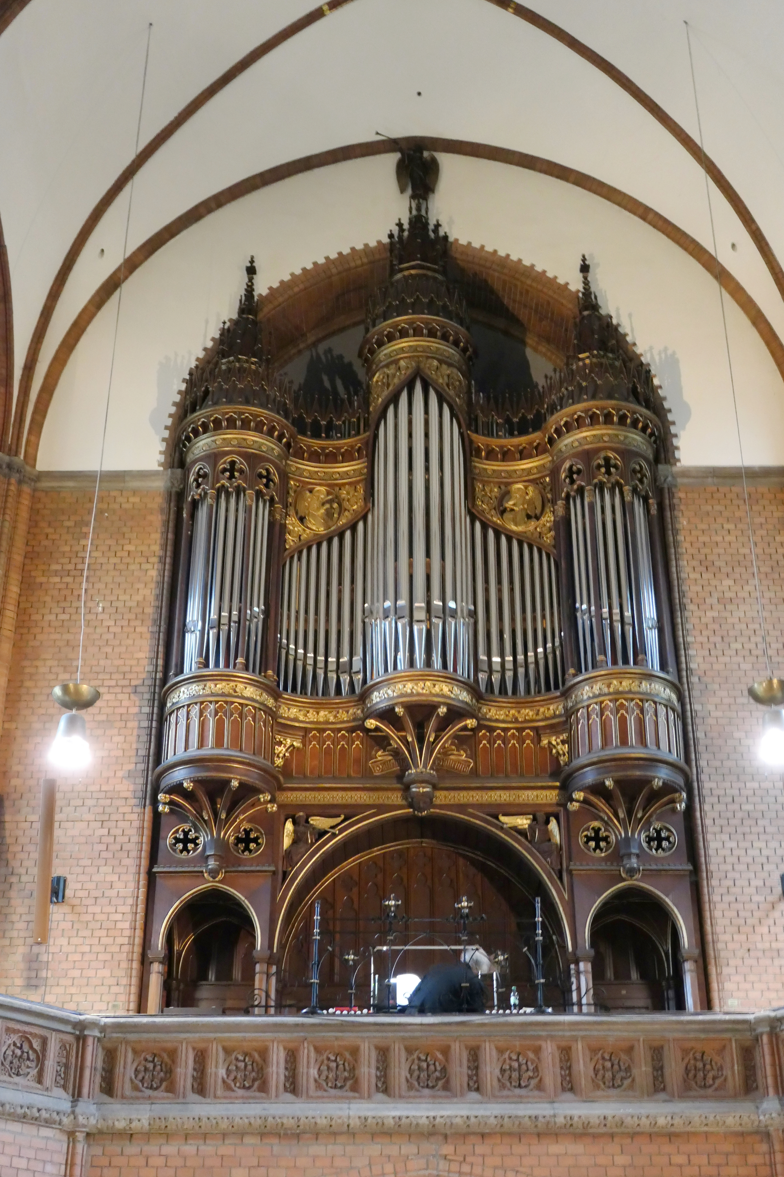 Orgel von St. Johannis, Hamburg-Harvestehude, Deutschland